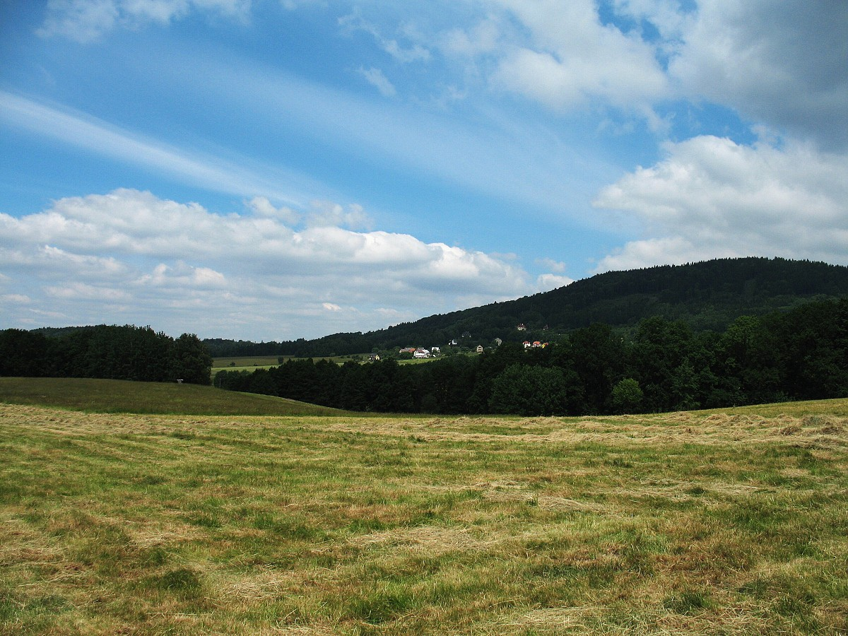 Pohled z údolí na horní část Křižan u nádraží a vrch Lom